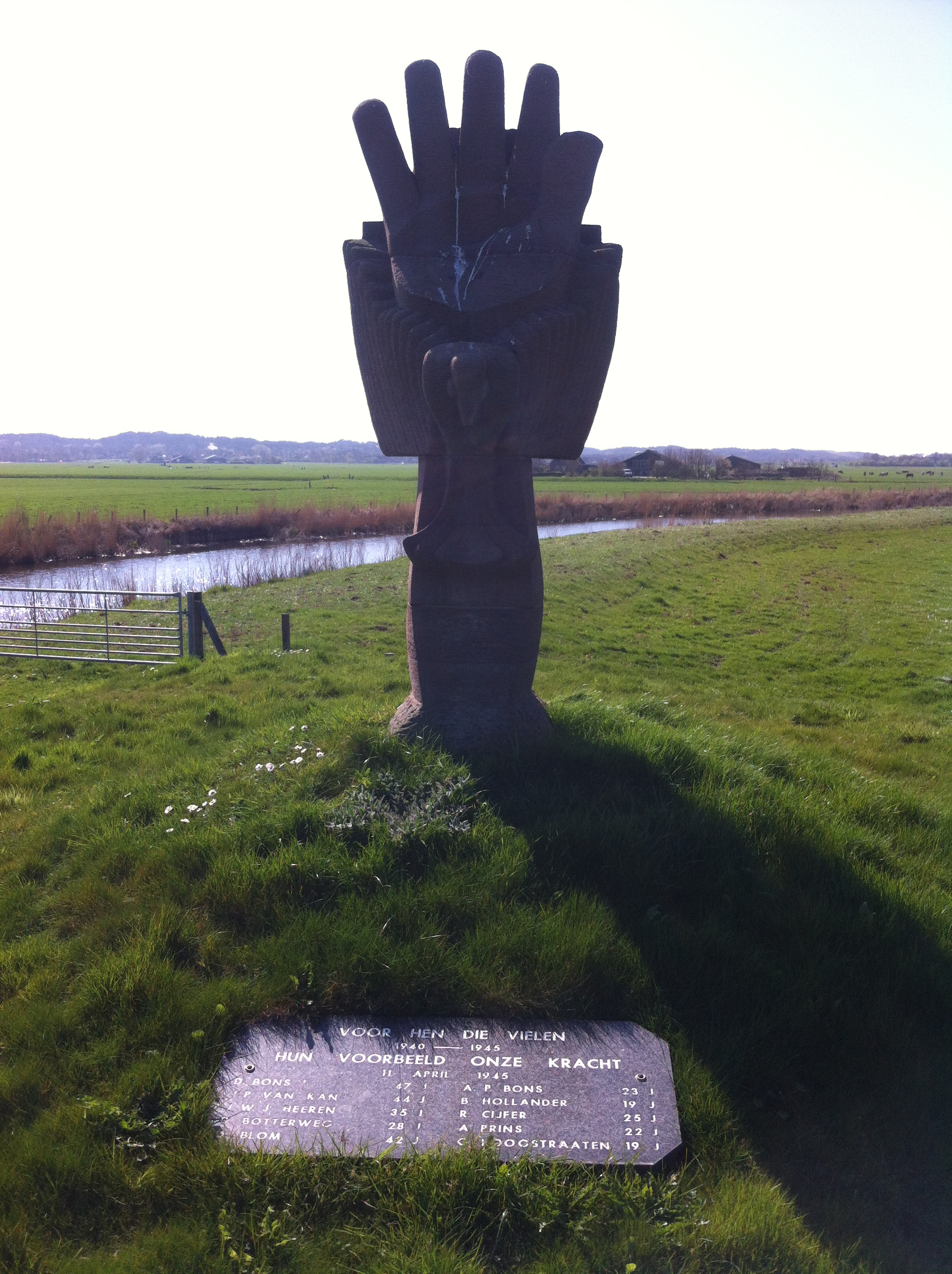 Het monument 'De tragedie van Zijpersluis' in Zijpersluis (voormalige gemeente Zijpe).